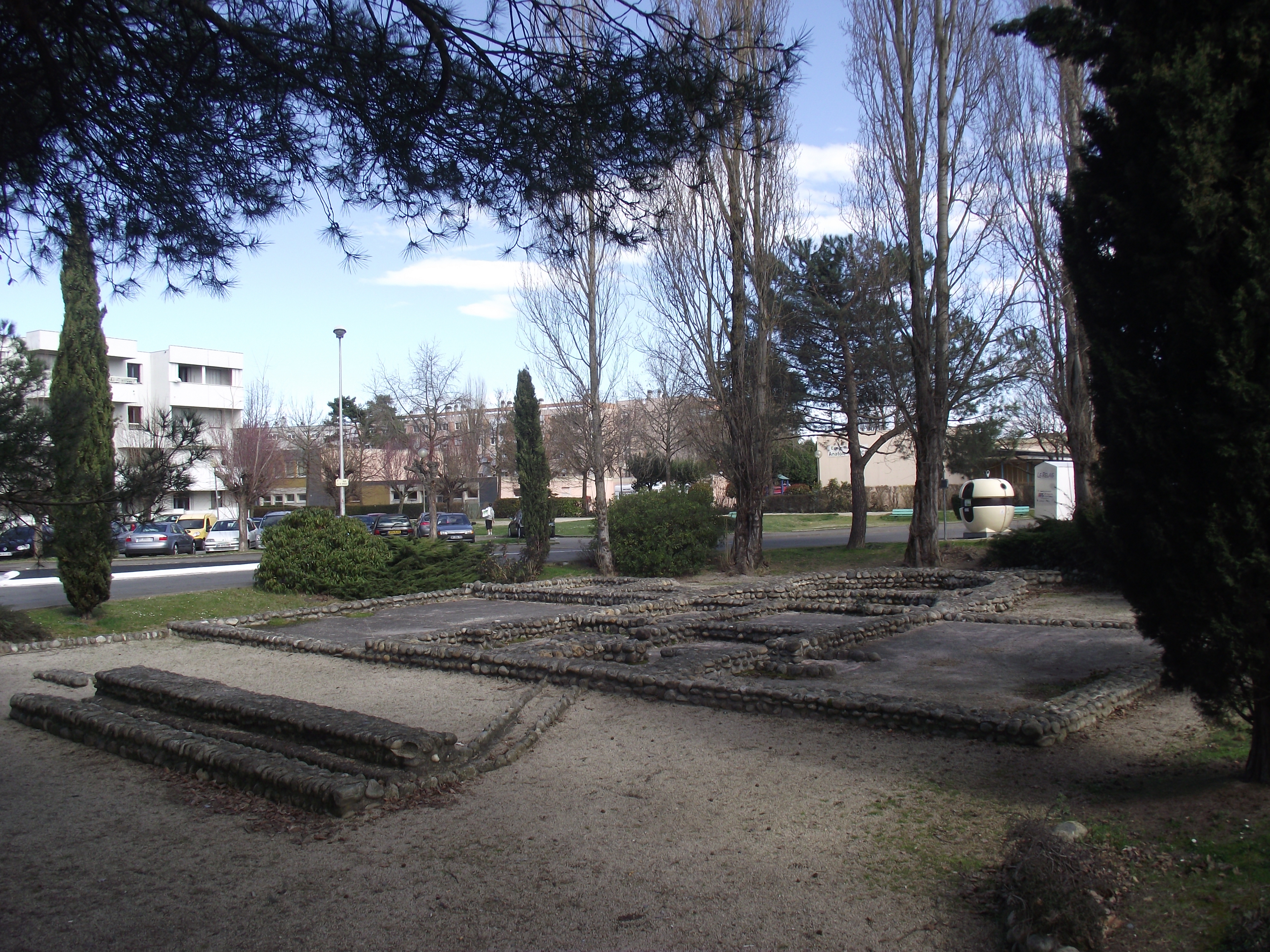 Villa antique de l'Ormeau (Tarbes, Hautes-Pyrénées, Midi-Pyrénées, France).